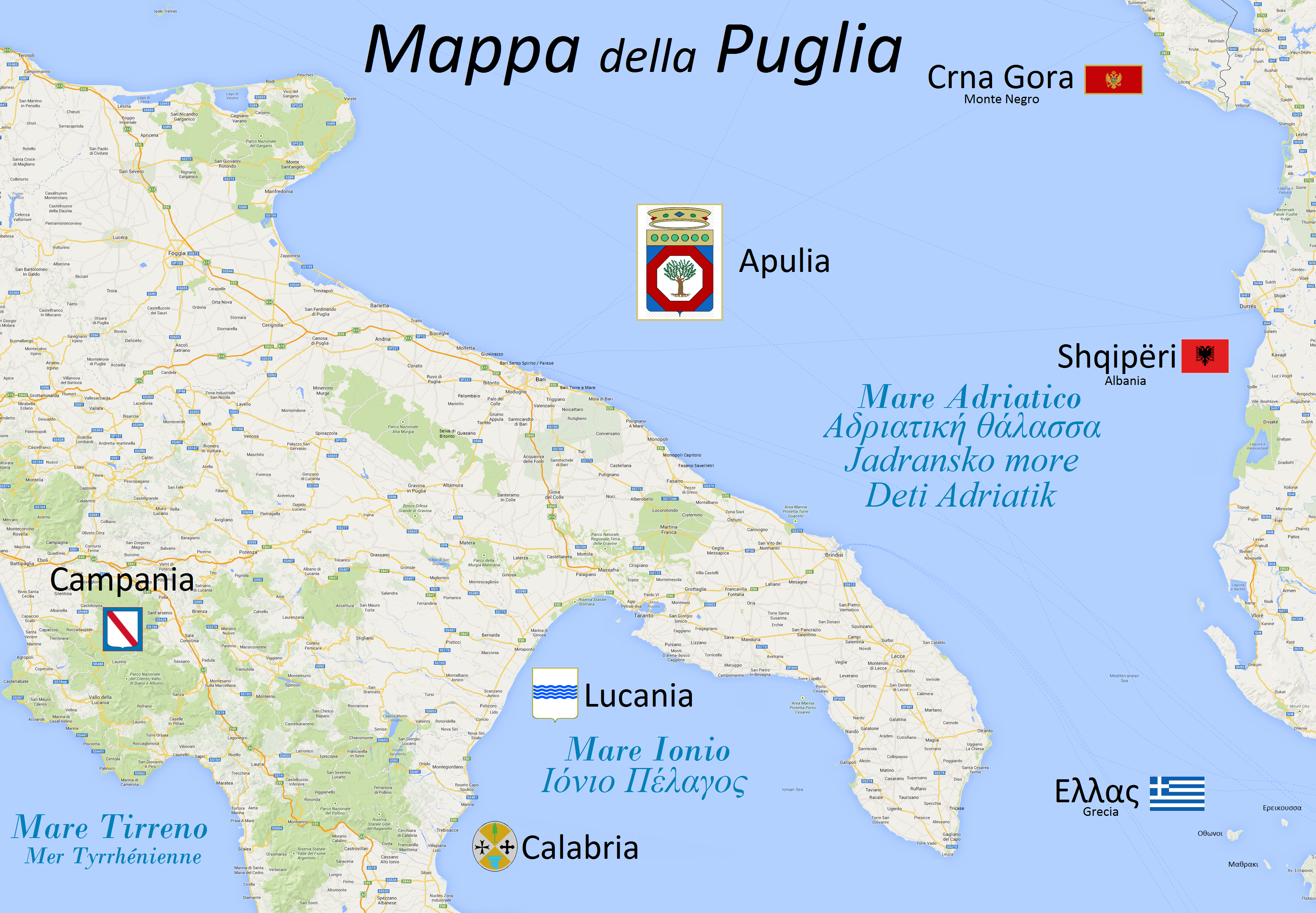 Mappa della Puglia dettagliata con stemmi delle Regioni e degli Stati vicini.